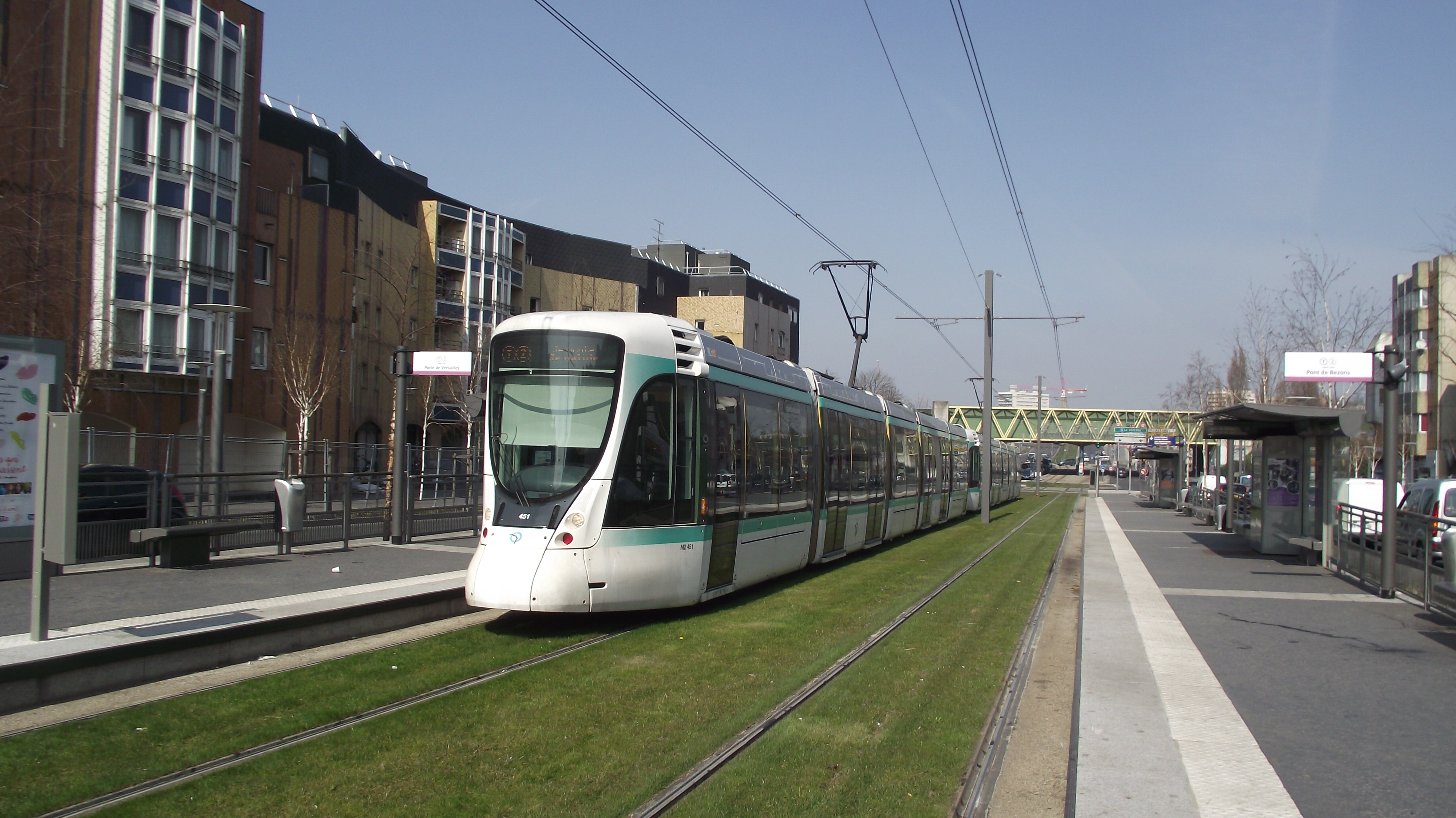 Trams bij de halte "Parc Pierre Lagravère" bij de verlenging naar het Noorden van de T2-tramlijn. Hier tram richting Porte de Versailles